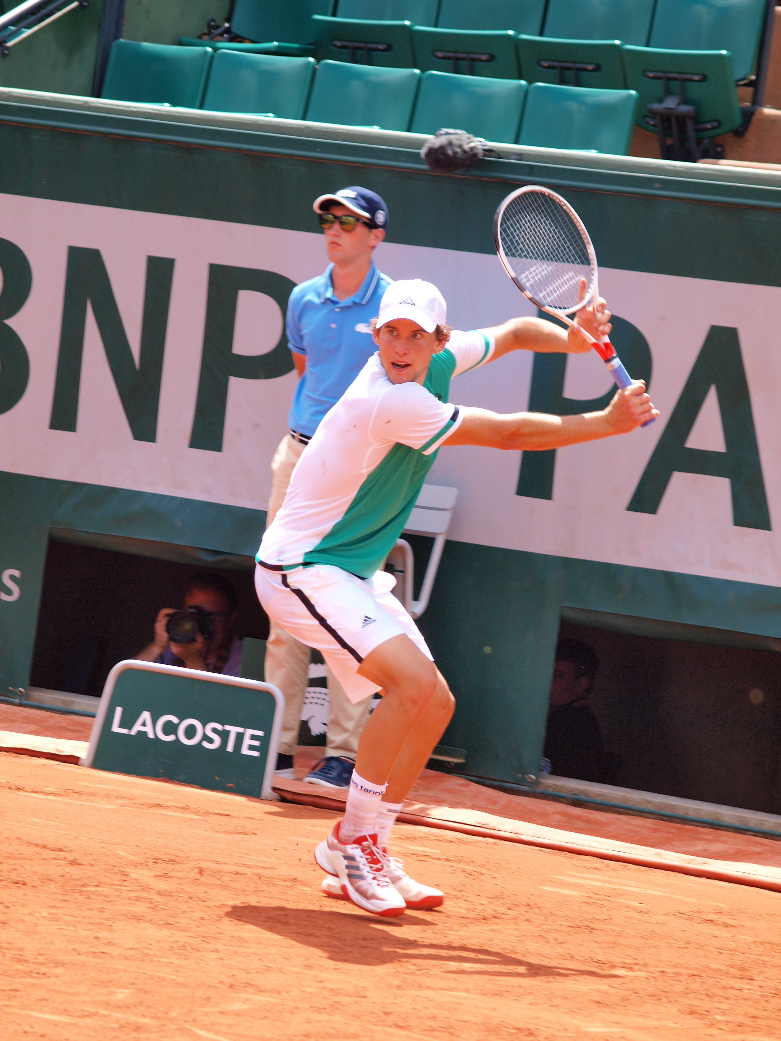 Dominic Thiem, aux Internationaux de France de Paris (Stade de Roland Garros) , le 31 mai 2017, dans son match contre Simone Bolelli